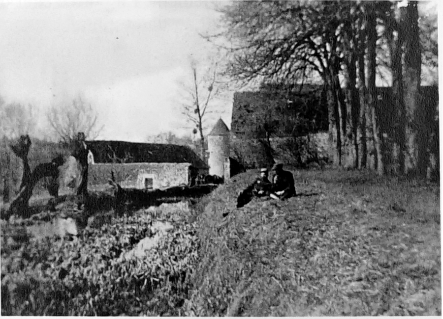 lors de la première guerre mondiale.